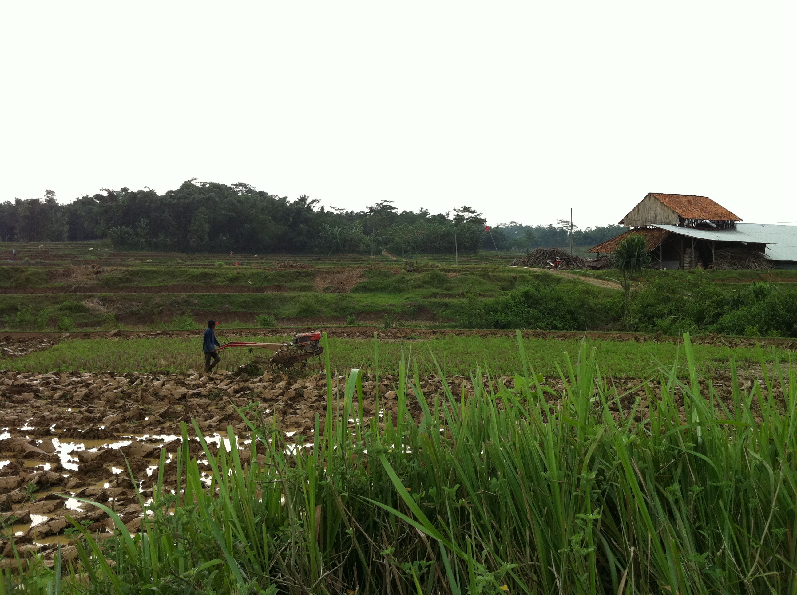 Bekasi, West Java, Indonesia